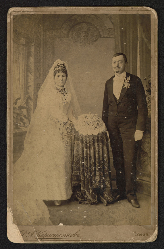 Иван и Донка Каранджулови